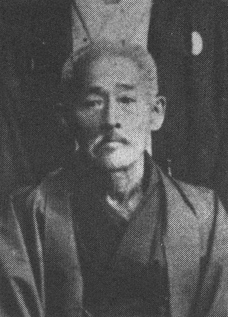 東恩納寛量(Higaonna Kanryo, 1853 - 1915)